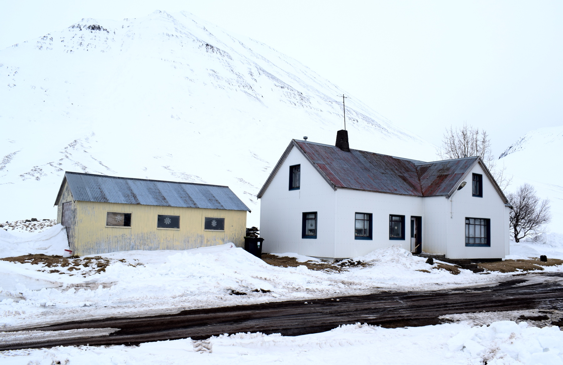 Kot er innsti bær í byggð í Svarfaðardal